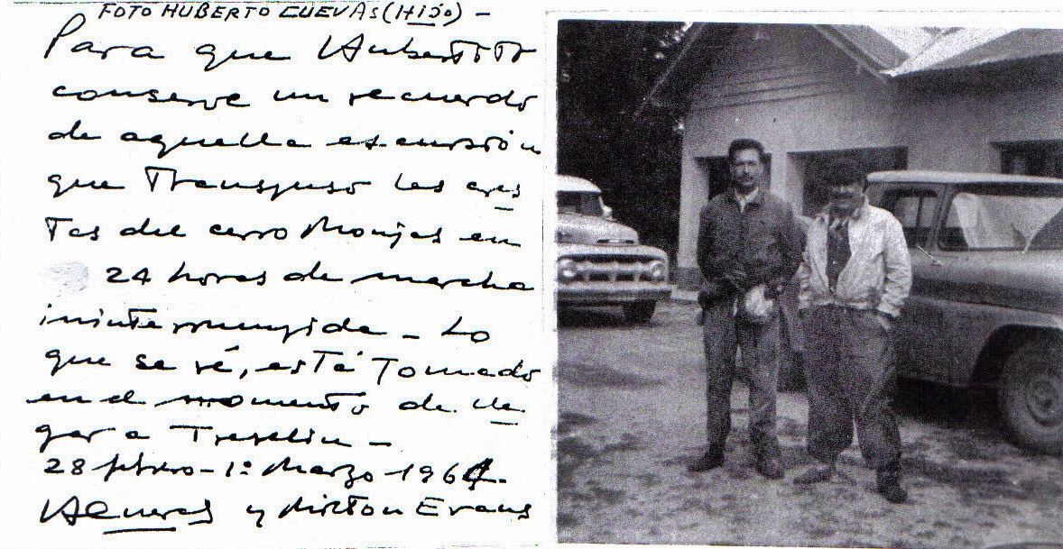 Huberto Cuevas Acevedo con su amigo Milton Evans en Trevelin, 1964, Establecimiento "el Malacara